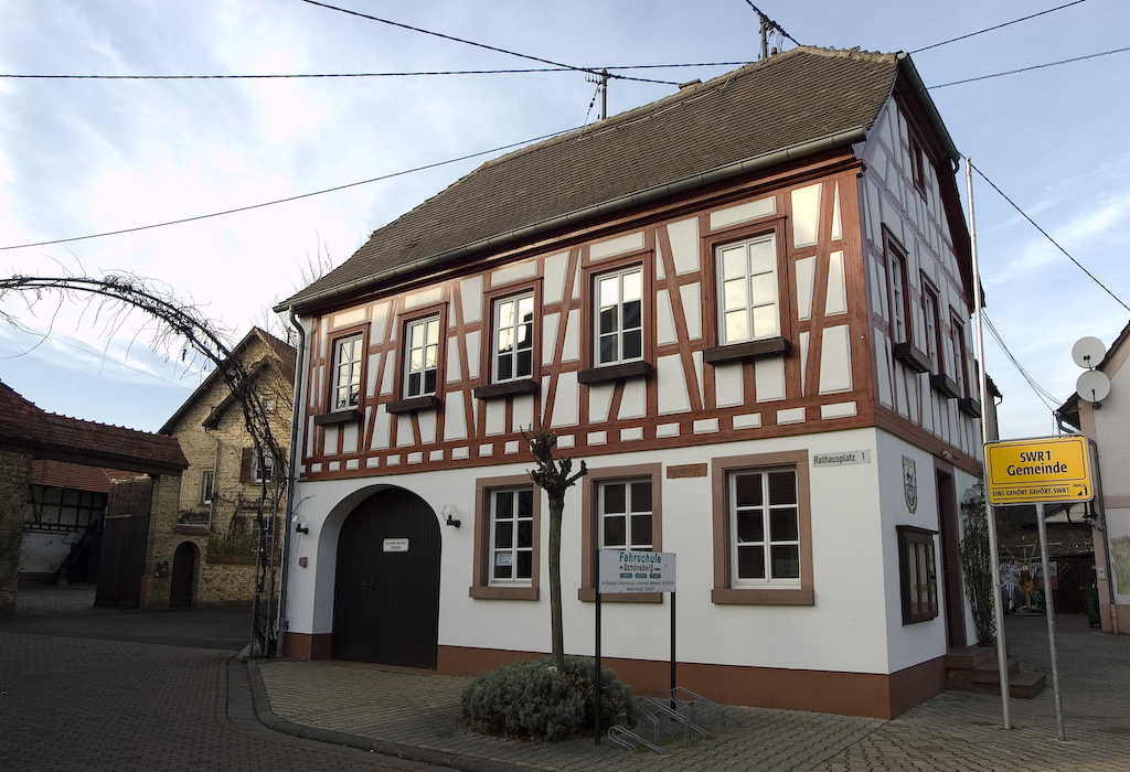 Das Rathaus in Uelversheim